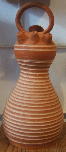 Botijo rayado Totana (Murcia). 'Alfarería de agua', obra de José María Bellón, Alfarero del Siglo XX. Ejemplar seriado, sin firmar. Museo de Cerámica de Chinchilla de Monte-Aragón (Albacete).